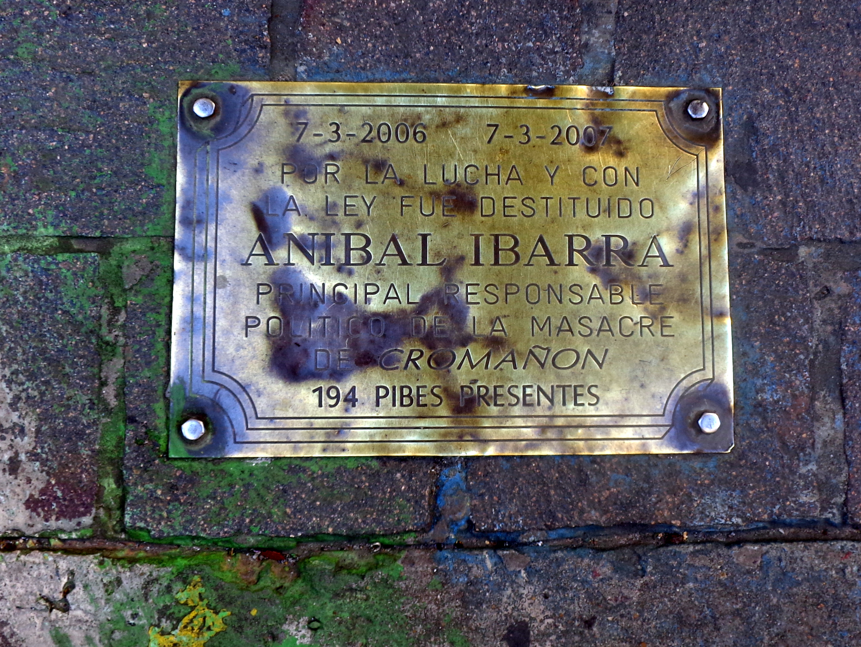 Placa en la calle Perú, sobre el piso, que recuerda la destitución de Anibal Ibarra como Intendente de Buenos Aires por considerárselo responsable político de las muertes en el incendio del boliche Cromañón. Buenos Aires, Argentina.